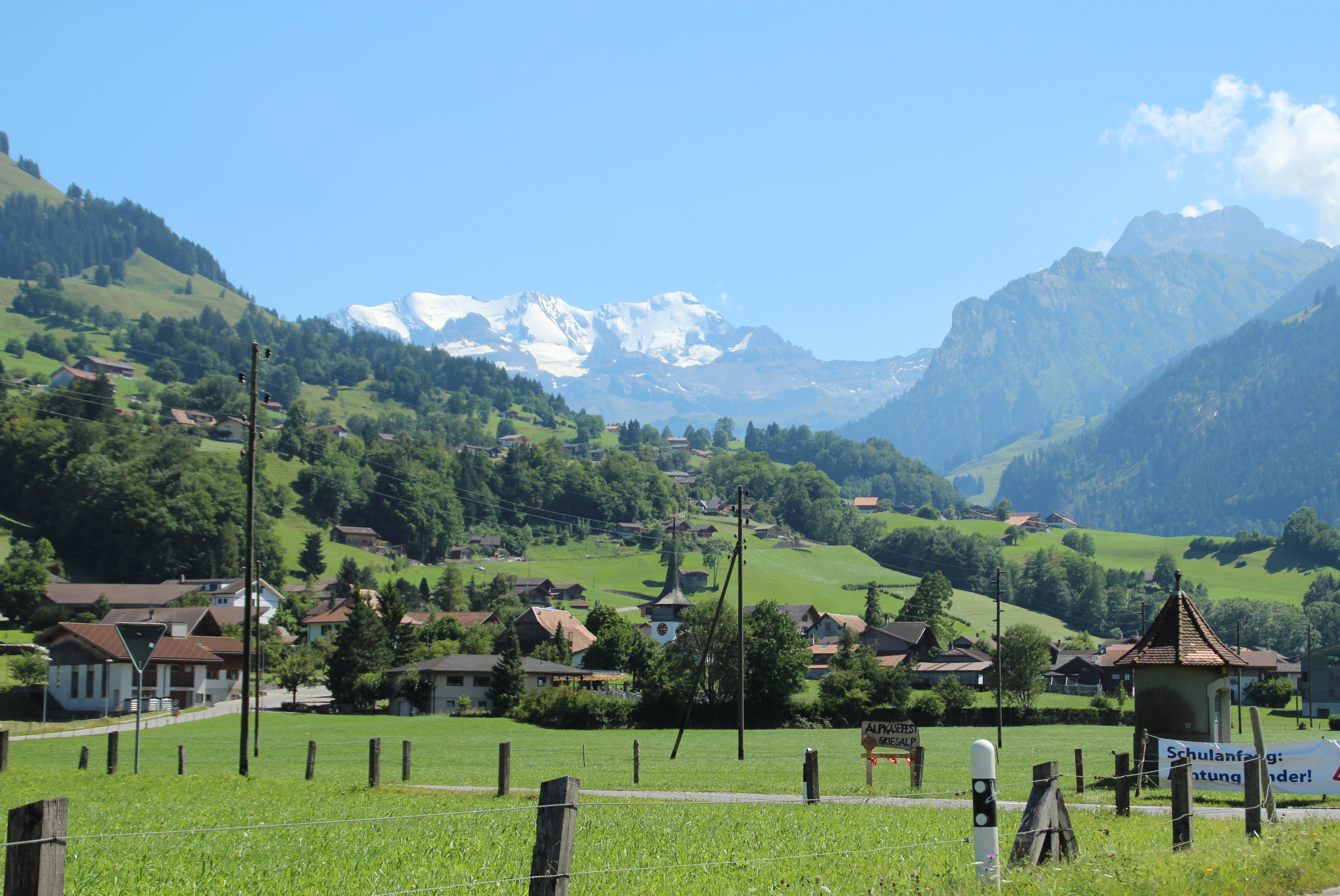 Reichenbach im Kandertal